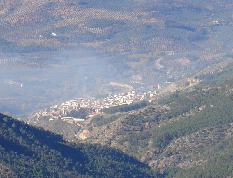 Vista de Orcera desde Navalperal